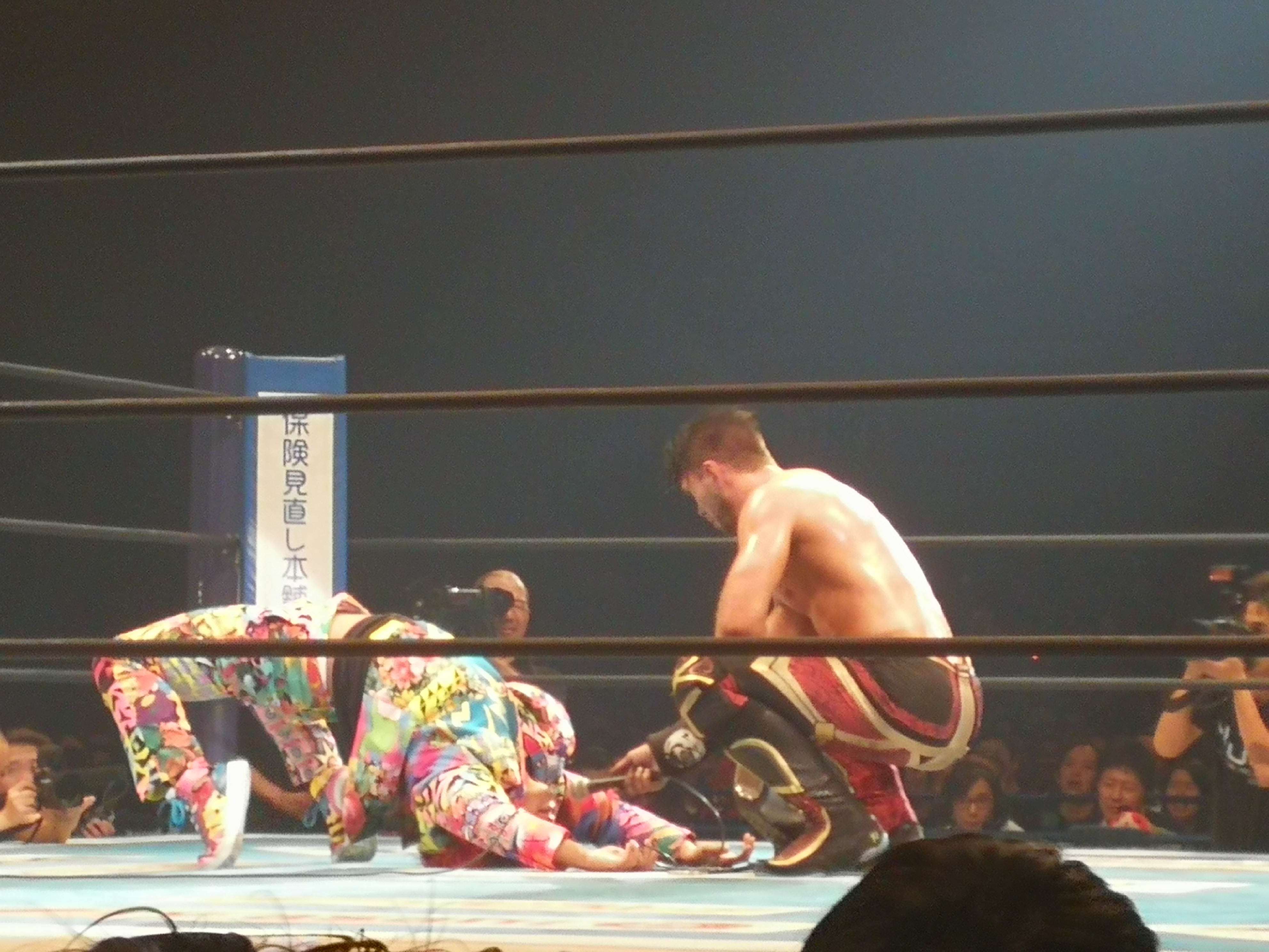 2019年11月ウィルオプスレイへの挑戦を要求する高橋ヒロム